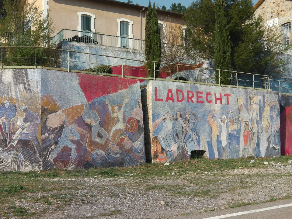 La grande fresque réalisée en 1981 sur le site de la mine de Ladrecht à Saint-Martin-de-Valgalgues (Gard)